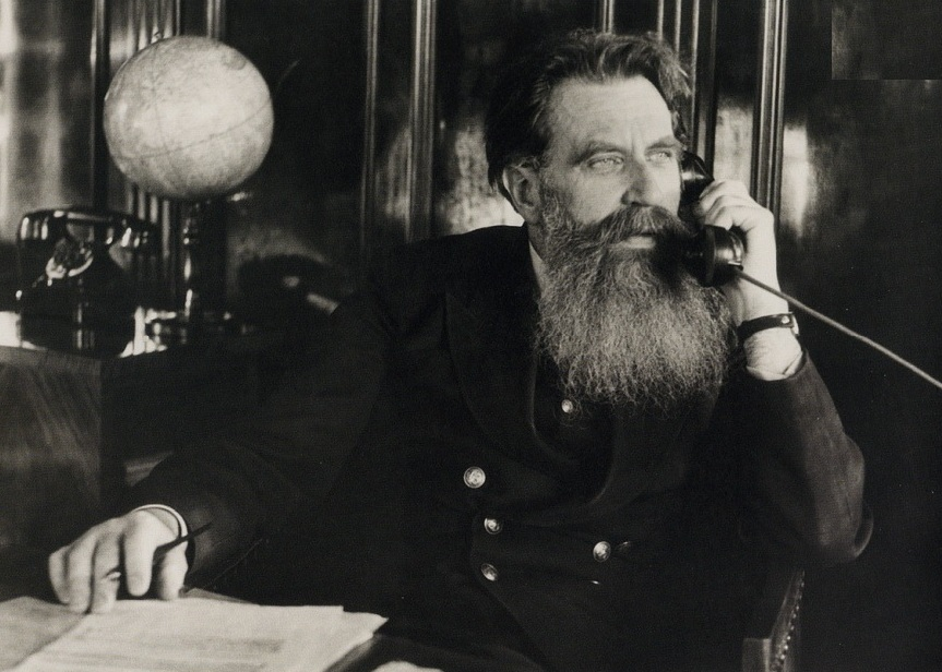 Отто Шмидт, начальник Главсевморпути, 1936